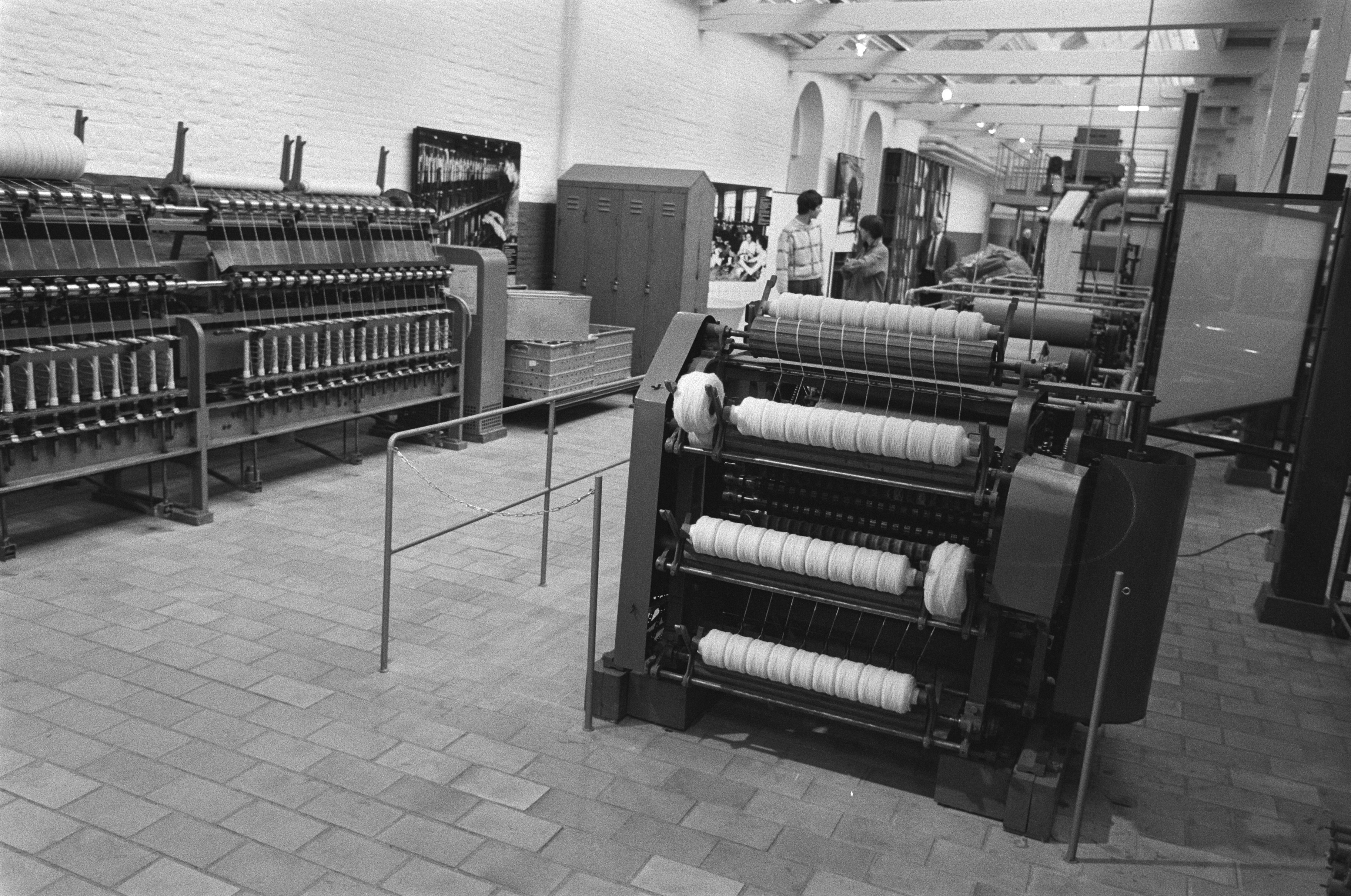 Collectie / Archief : Fotocollectie Anefo Reportage / Serie : Textielmuseum Tilburg Beschrijving : [Textielmuseum Tilburg] interieur Datum : 18 maart 1986 Locatie : Noord-Brabant, Tilburg Trefwoorden : musea, weverijen Fotograaf : Bogaerts, Rob / Anefo, [onbekend] Auteursrechthebbende : Nationaal Archief Materiaalsoort : Negatief (zwart/wit) Nummer archiefinventaris : bekijk toegang 2.24.01.05 Bestanddeelnummer : 933-5992